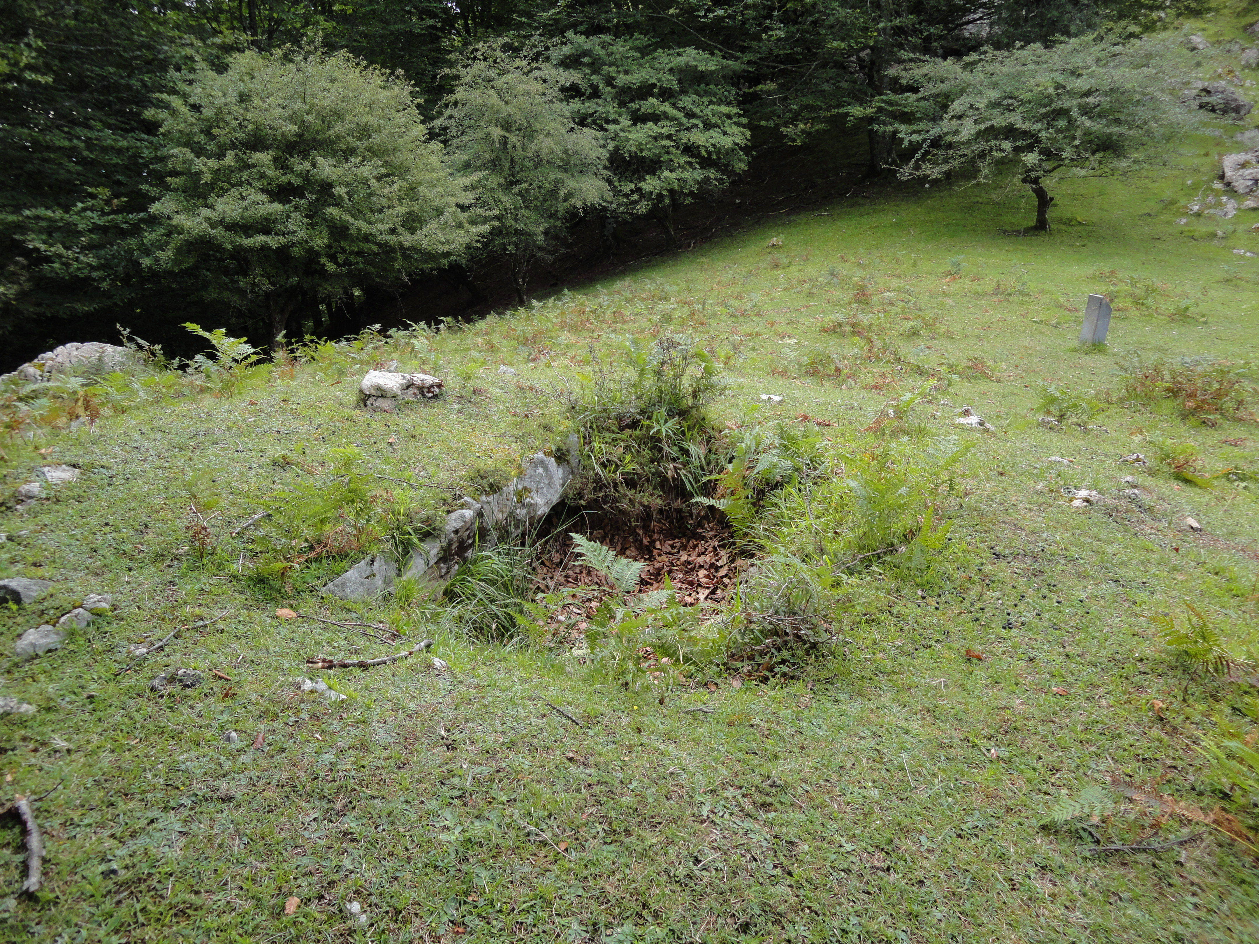 Garagarza trikuharria